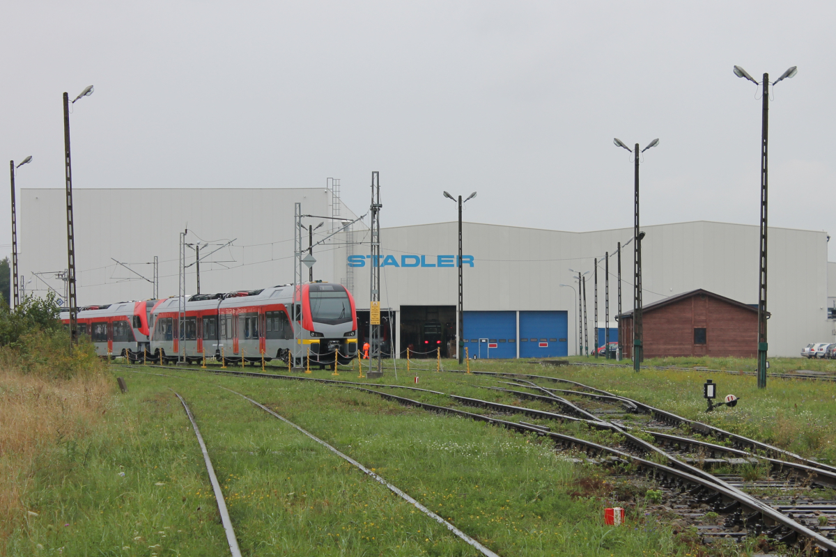 Zakład Stadler Polska w Siedlcach. This photo was taken during Railway Wikiexpedition 2014 set up by Wikimedia Polska Association in cooperation with Fundacja Grupy PKP. You can see all photographs in category Wikiekspedycja kolejowa 2014.